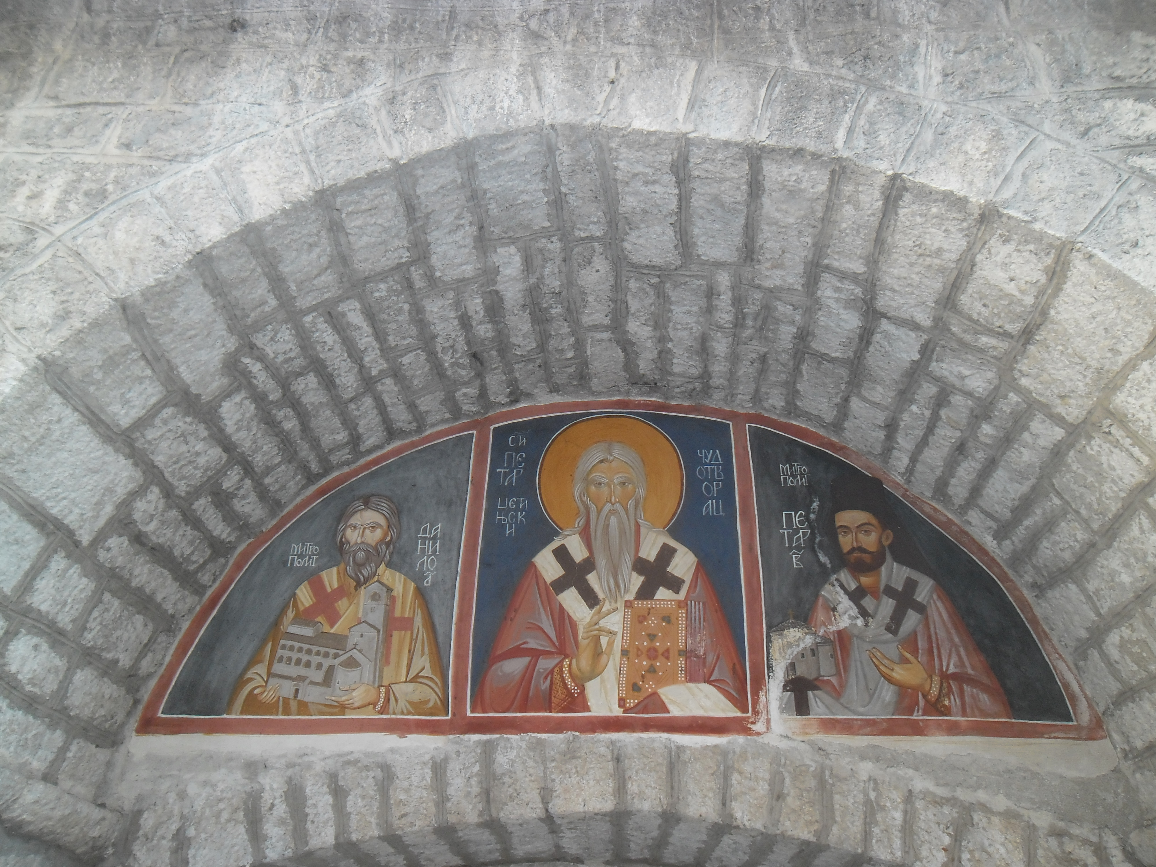 Cetinje